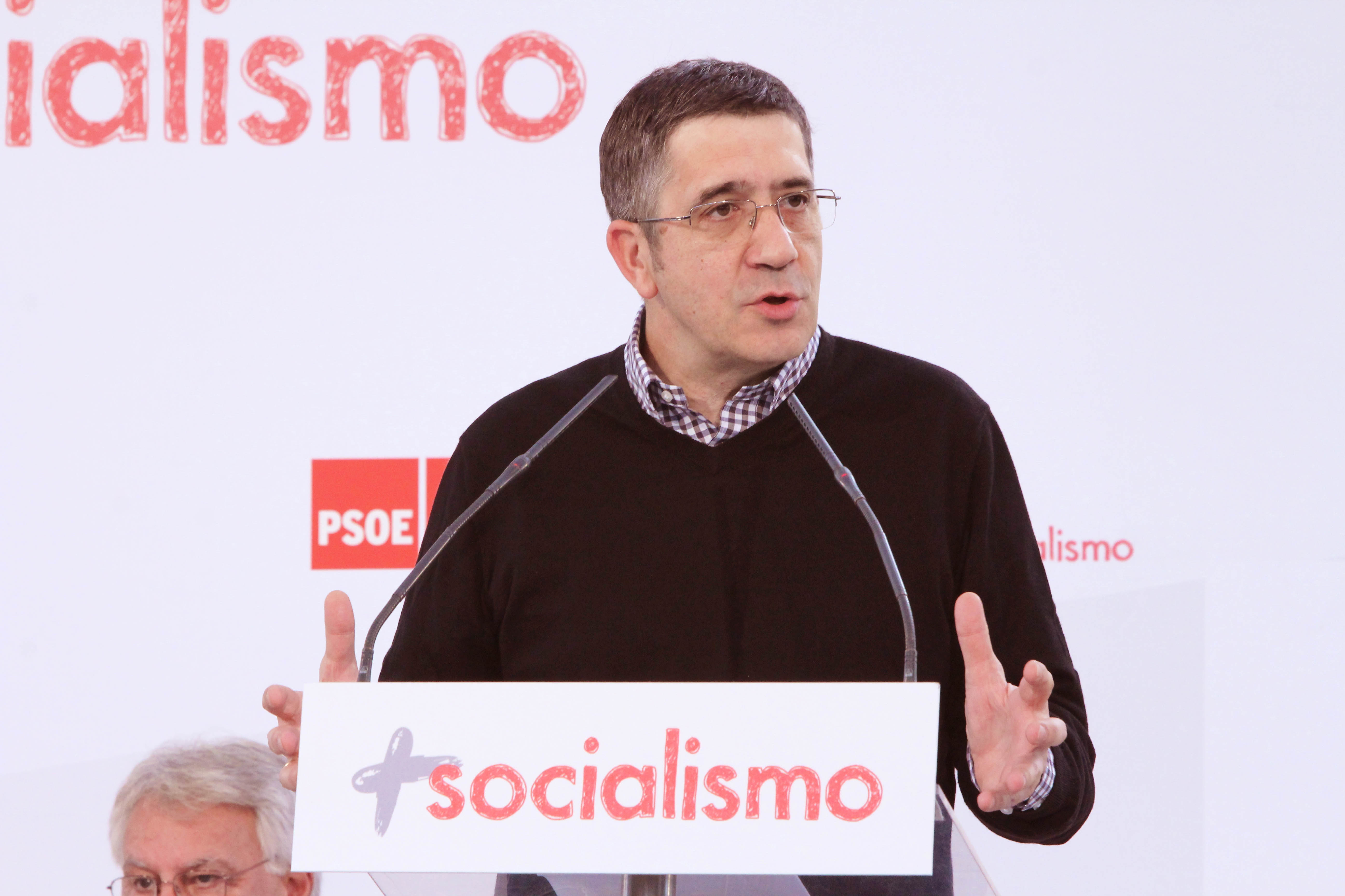 Patxi López en un acto en Madrid con Felipe González y Alfredo Pérez Rubalcaba